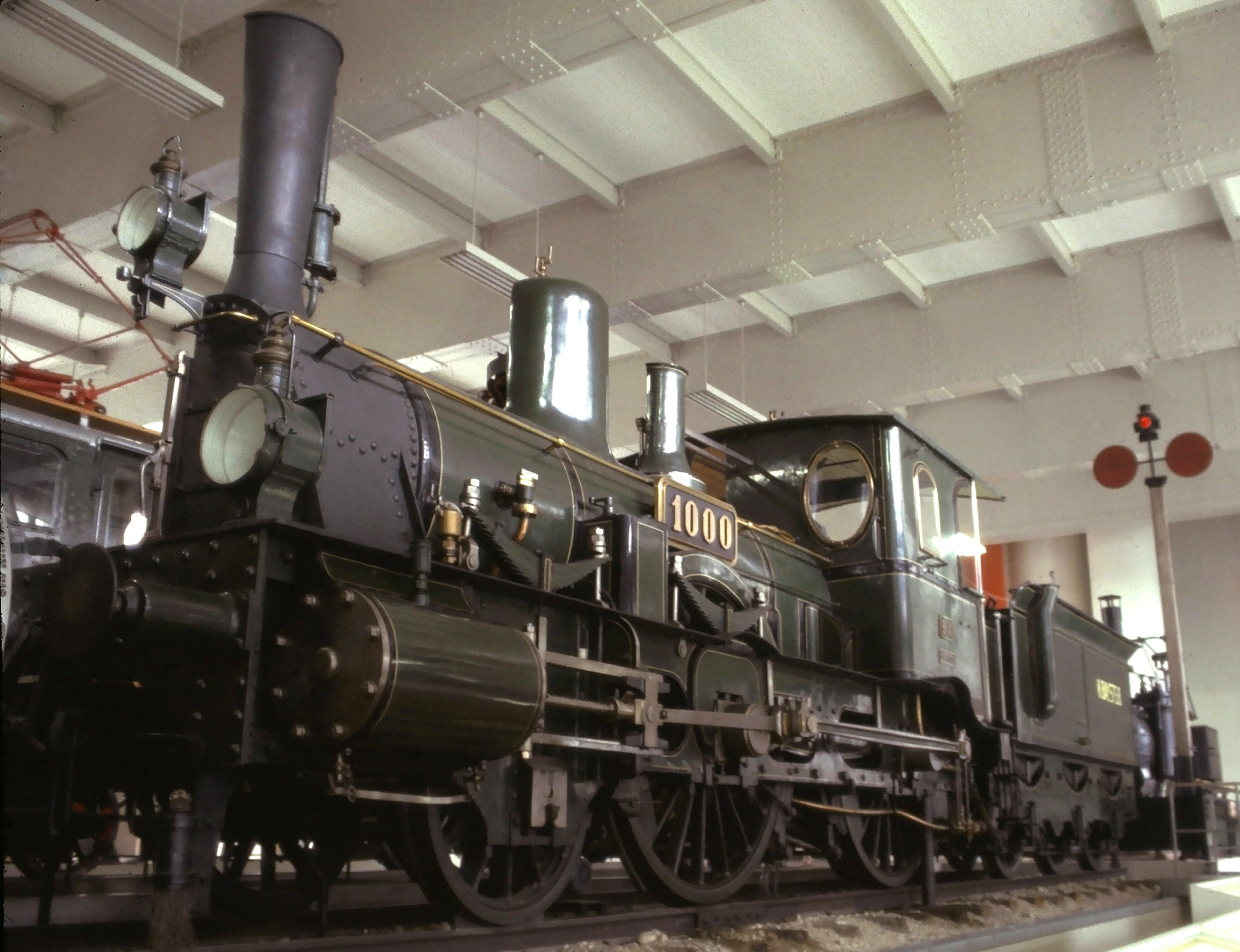 Bavarian B IX '1000' in the Deutsche Museum, Munich